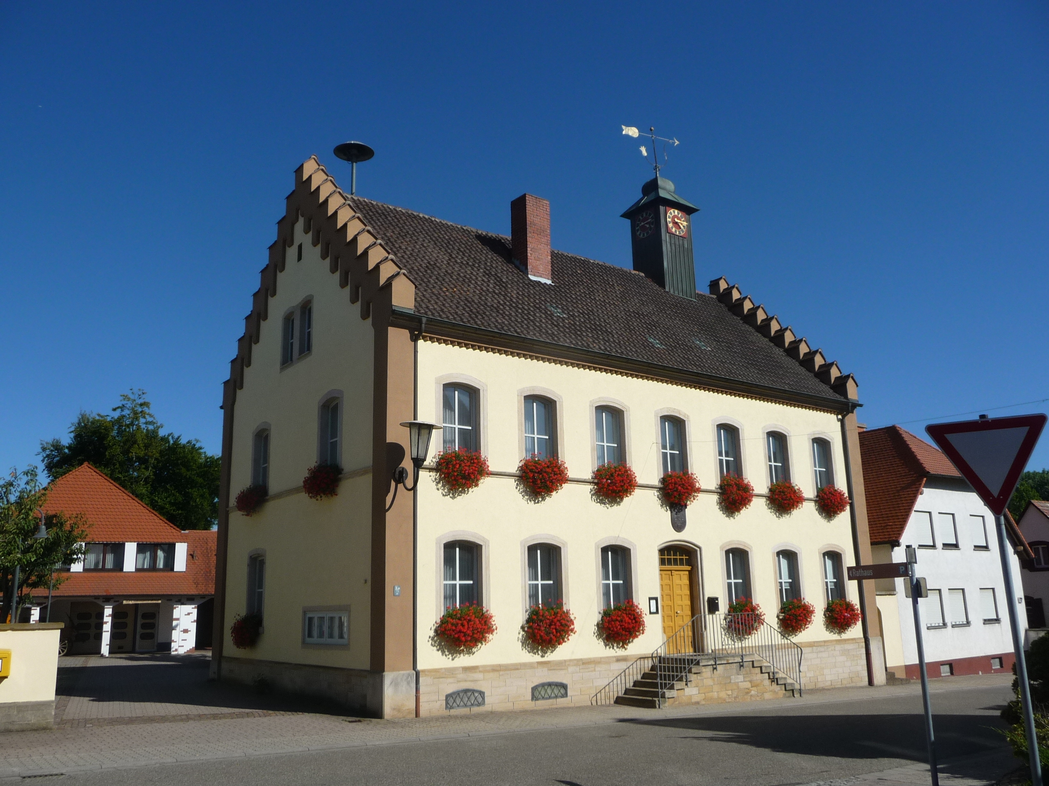 Hördt ist eine Ortsgemeinde im Landkreis Germersheim in Rheinland-Pfalz.